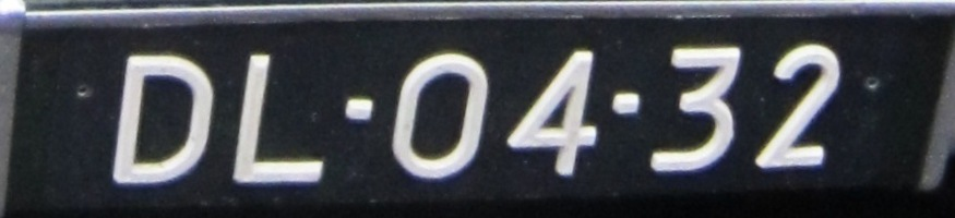 Oldtimer kenteken